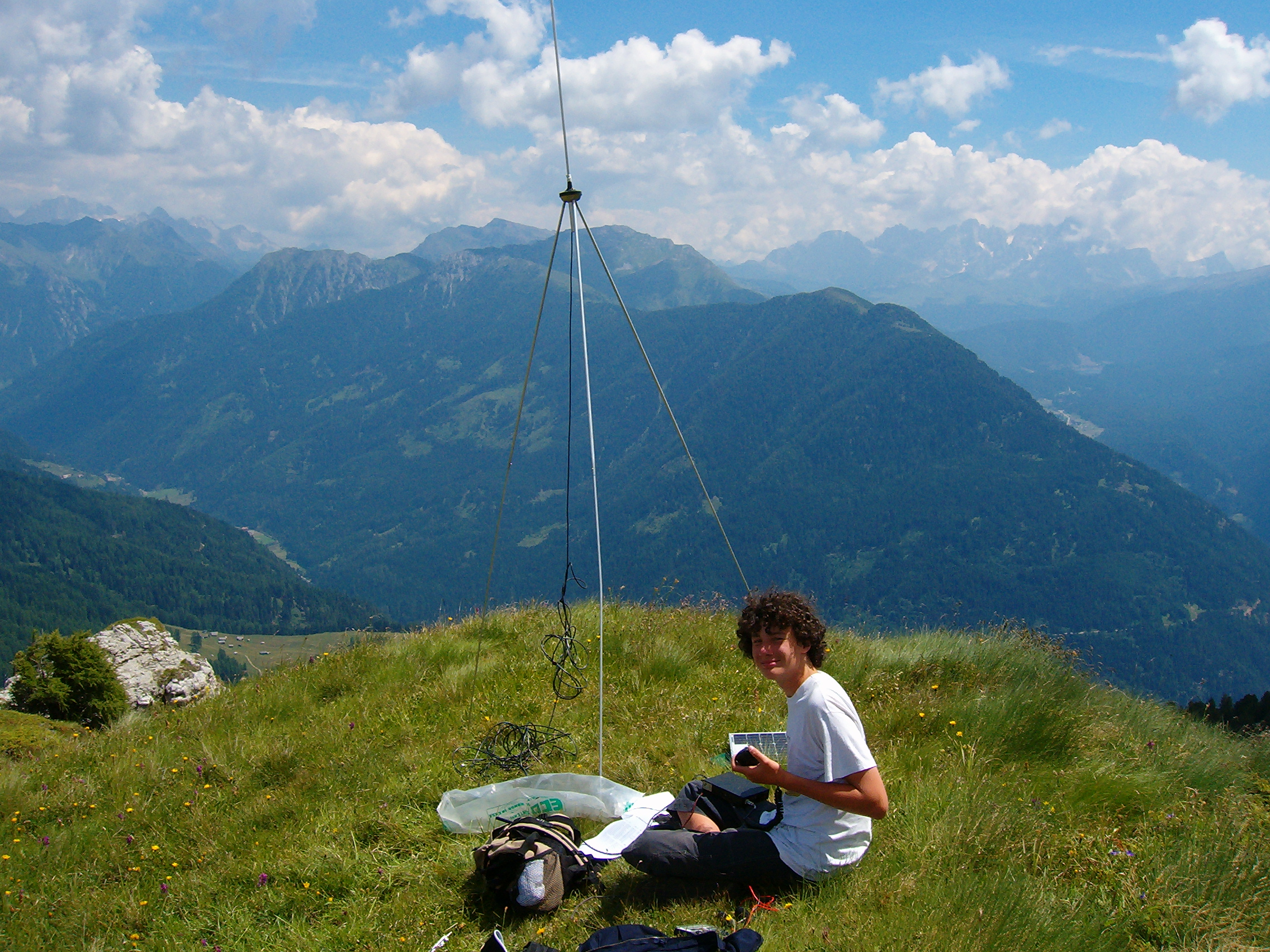 Giacomo Zorzi Radioamatore Copyright 2005 Giacomo Zorzi Foto: Giacomo Zorzi